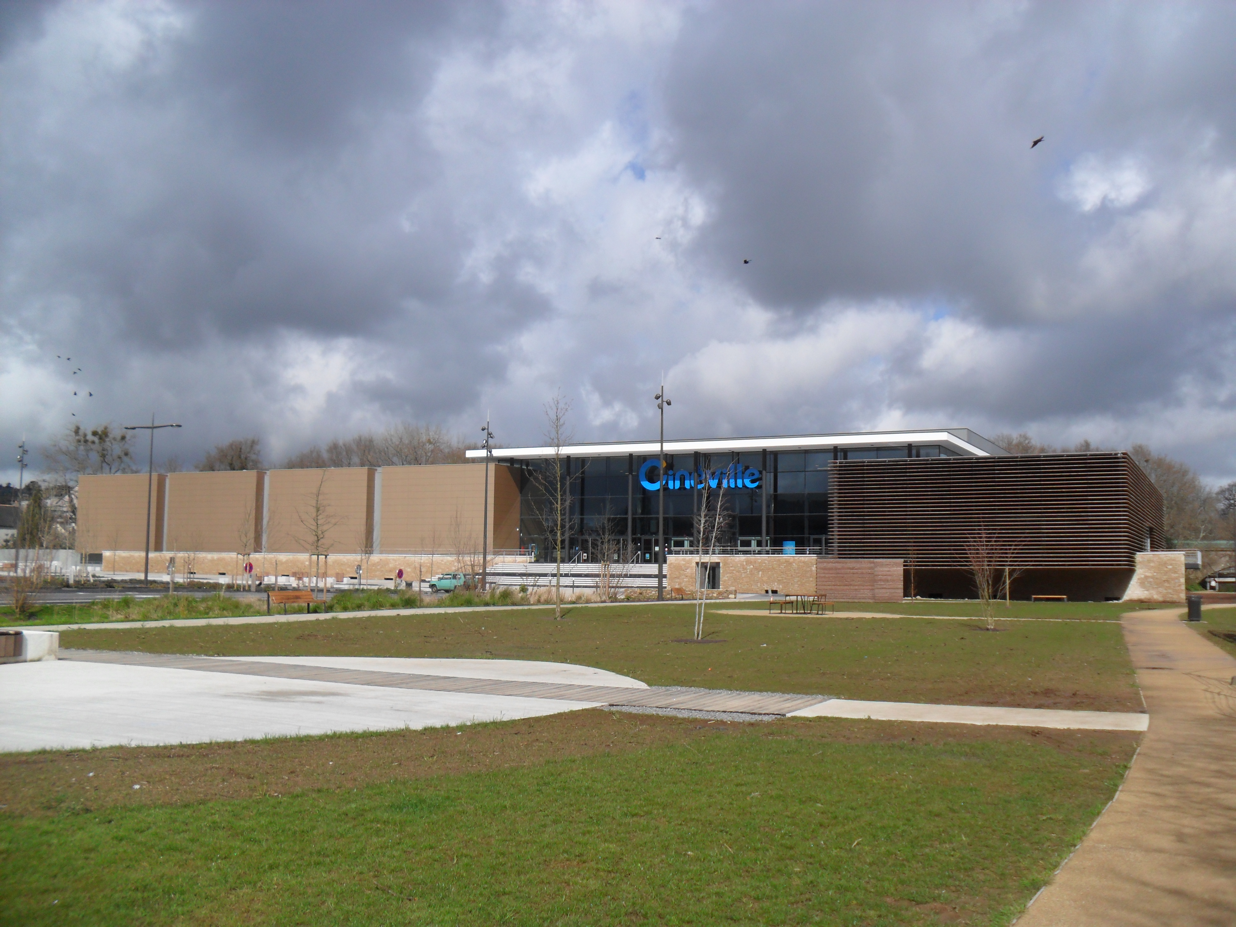 Cinéville de Quimper (France)